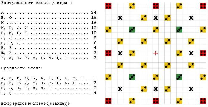 Srpskohrvatski / српскохрватски: Kvizovka, slova i ploča za igranje kvizovke